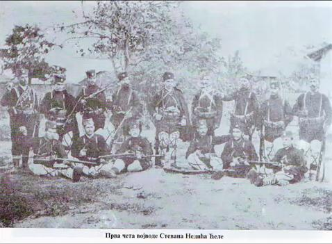 Serbian Chetnik Voivode Stevan Nedić's first cheta